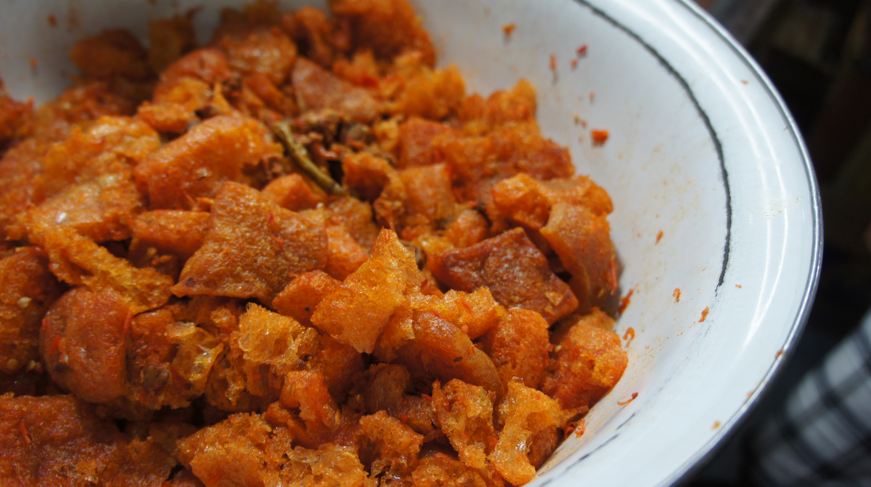 Krecek atau Kerecek, Yogyakarta